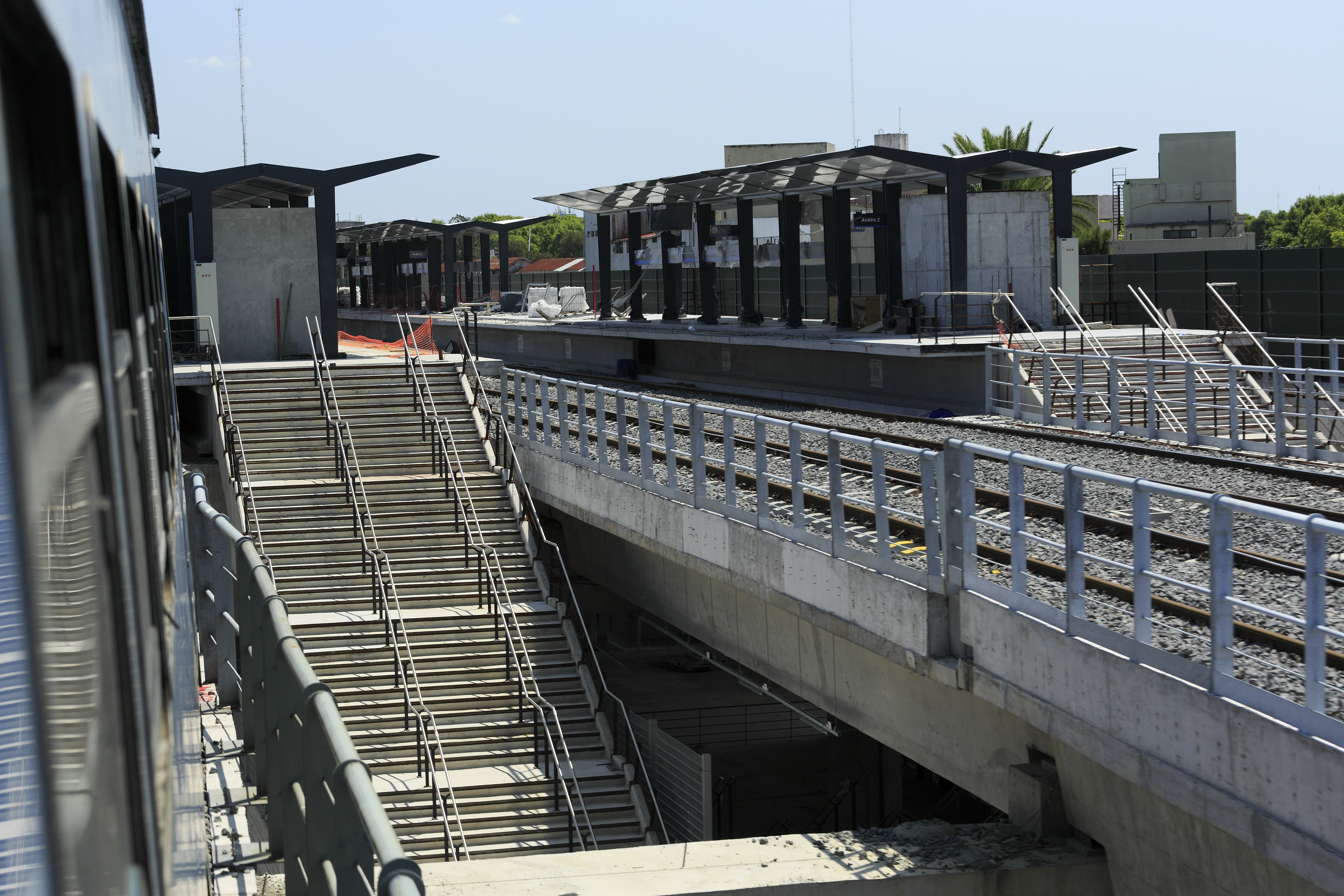 Richtung Dr. Cabred, vor den zwei neugebauten Inselbahnsteigen teilen sich die vier Gleise auf. Unter der Brücke kreuzt an dieser Stelle die calle Manuel Ricardo Trelles, hier bestand vor den Bauarbeiten ein intensiv genutzter Wegübergang. Nicht völlig klar ist die Aufteilung der Zugangstreppen in eine schmale und zwei breite Spuren. Möglicherweise ist die schmale Spur eine Hilfe für Gehbehinderte, doch wären beim recht großen Höhenunterschied Rolltreppen sinnvoller.